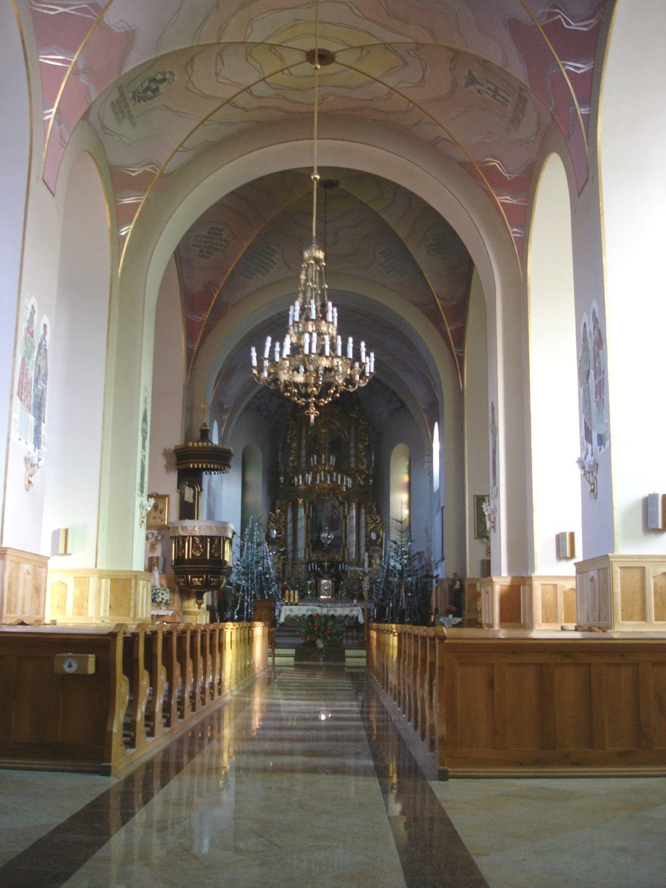 Kościół rzymskokatolicki pw. św. Stanisława Kostki w Birczy